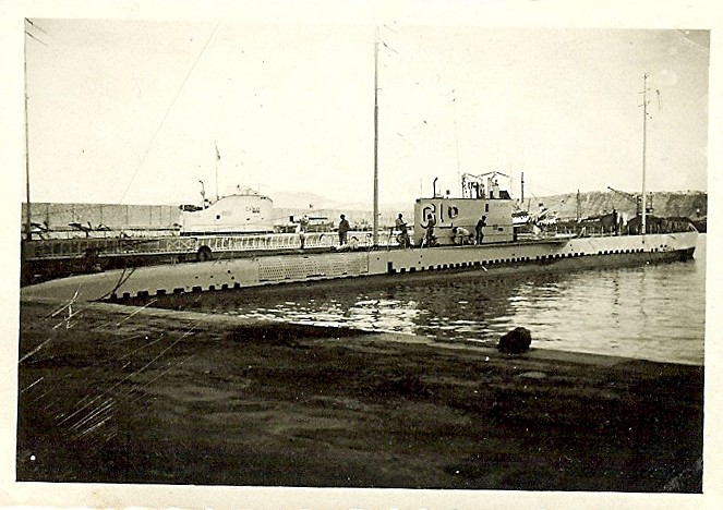 Sous-marins amarrés au quai Lamoune dans le port d'Oran le 31 mai 1934. La Galatée (Q 132), numéro de coque GL à l'époque en premier plan, le Caïman (Q 127) du type Requin en arrière plan.